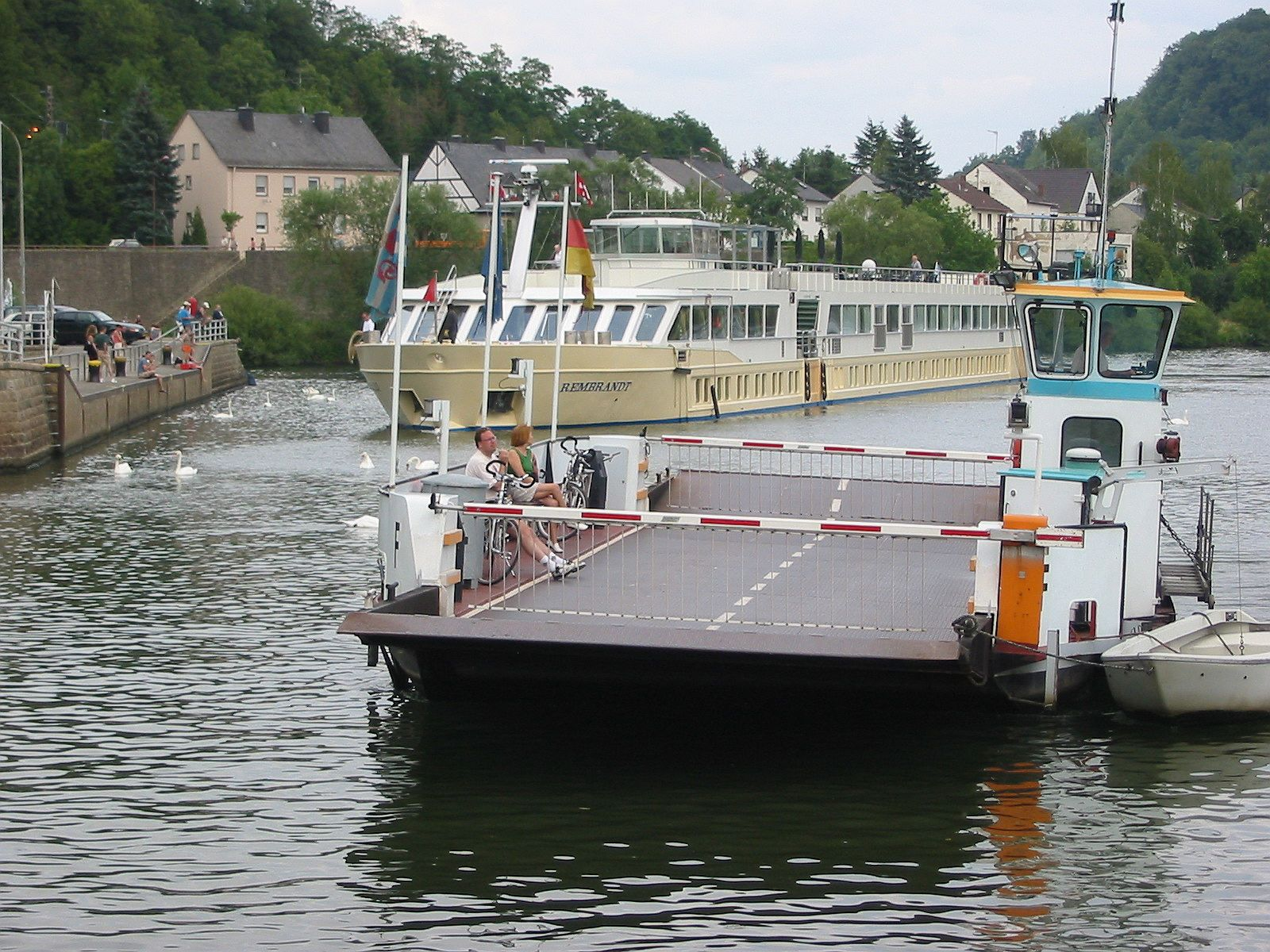 Fähre Wasserbillig